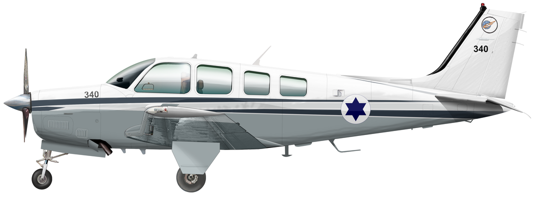 מטוס חופית מספר 340 של טייסת 135 של חיל האוויר